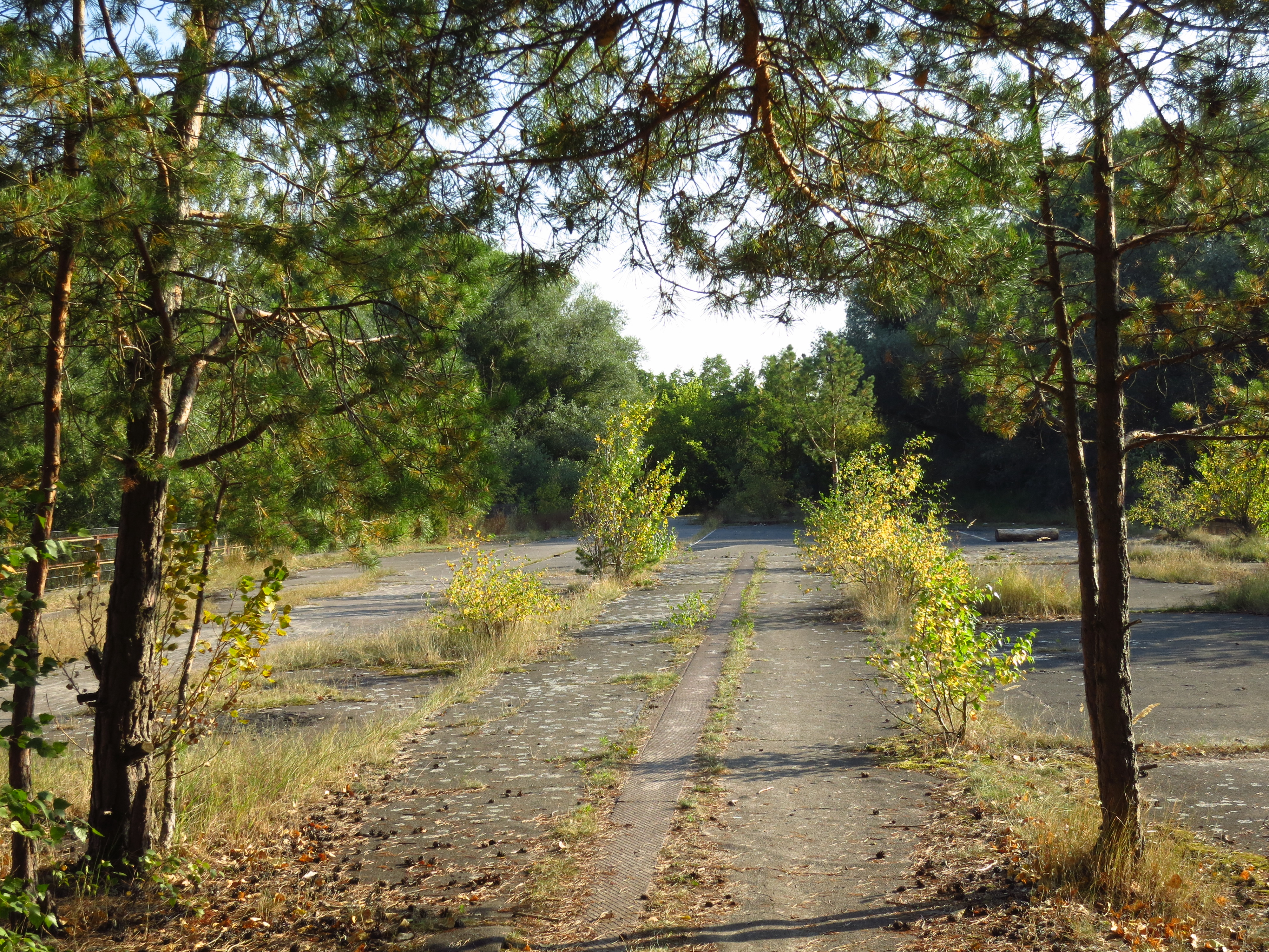 Autobahnbrücke Dreilinden, PlateauThis is a photograph of an architectural monument.